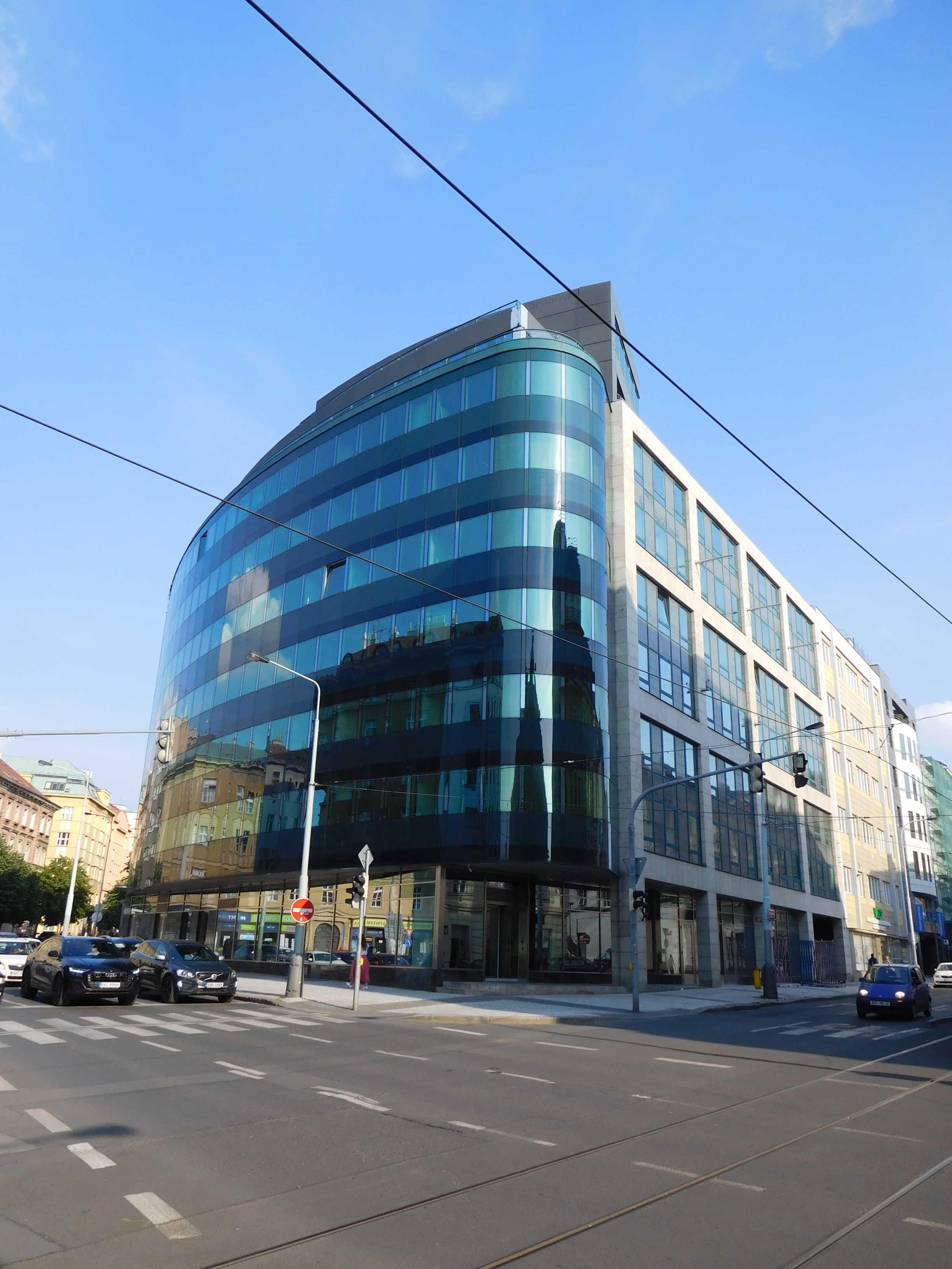 Praha - Vinohrady, Bělehradská 132